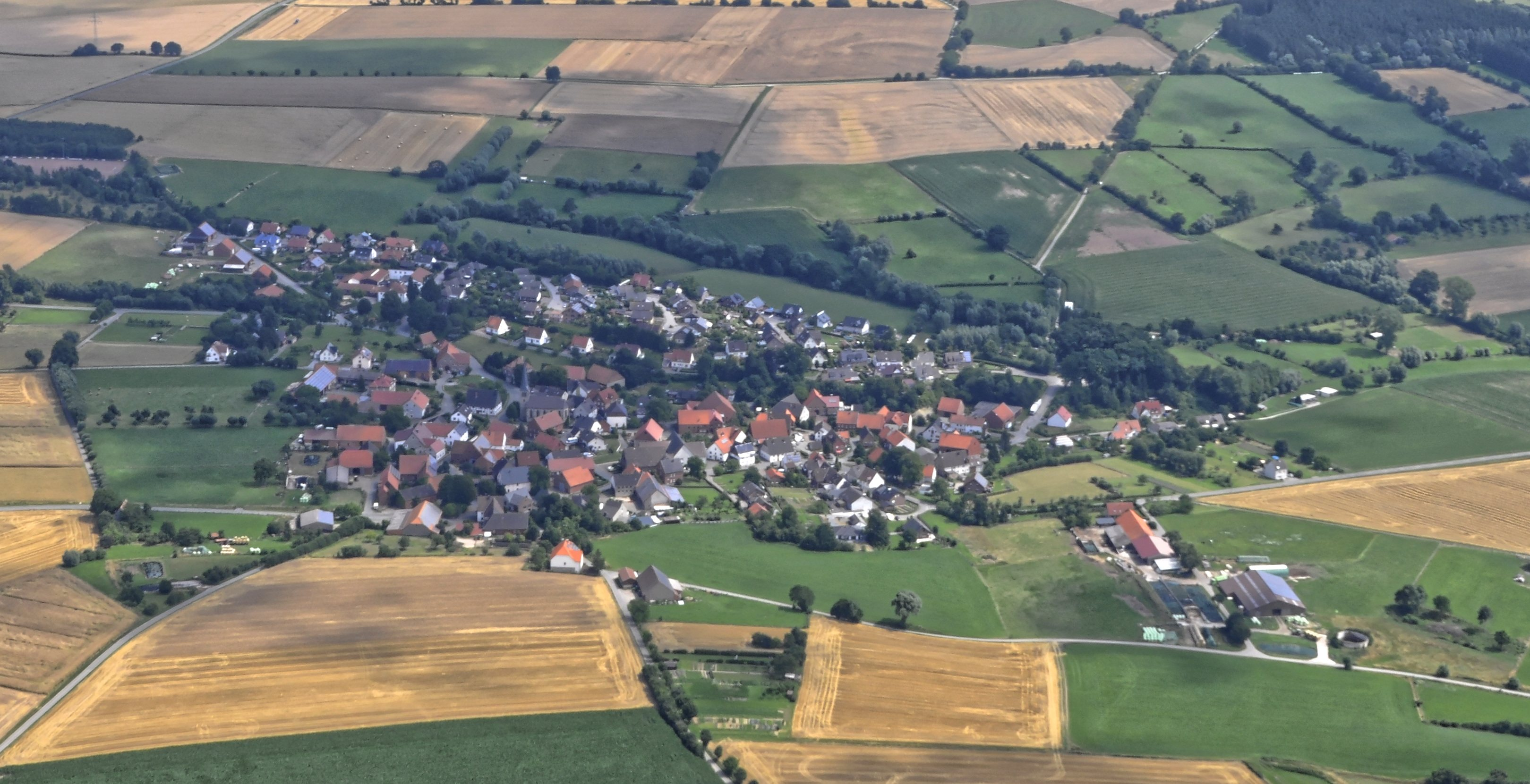 Bilder vom Flug Nordholz-Hammelburg 2015: Eversen (Nieheim)